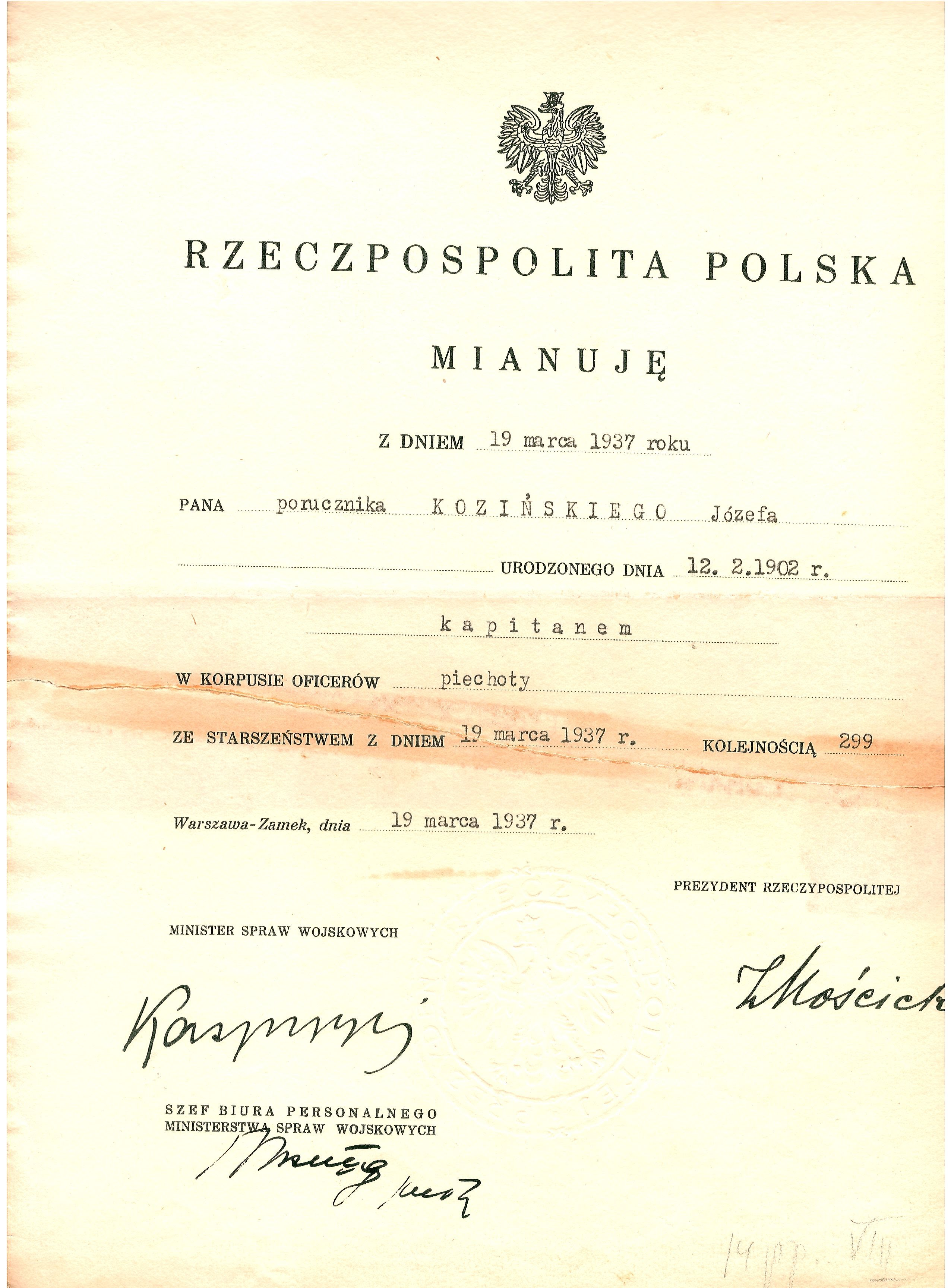 Dyplom awansowania na kapitana